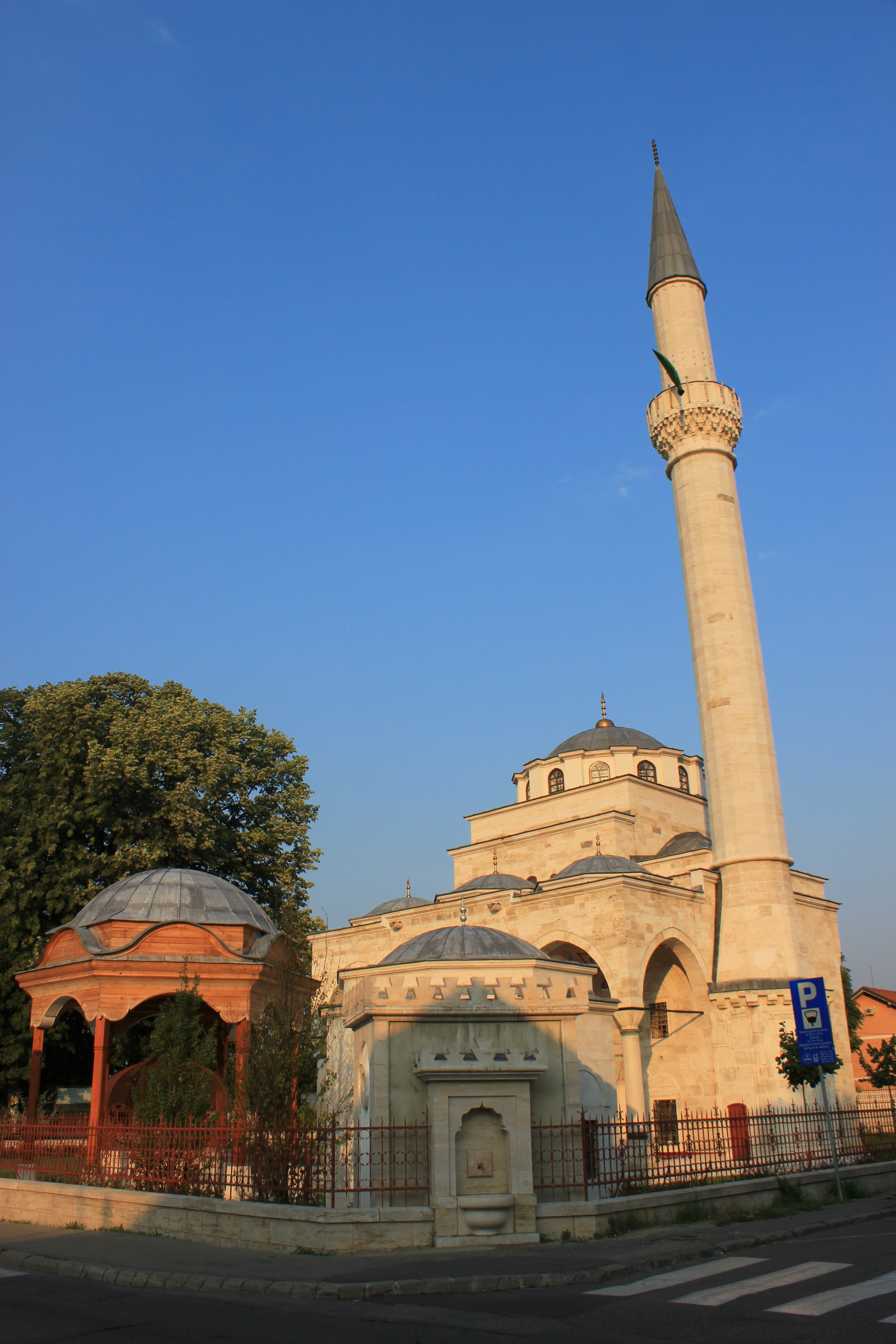 Die wiederaufgebaute Ferhadija-Moschee in Banja Luka.